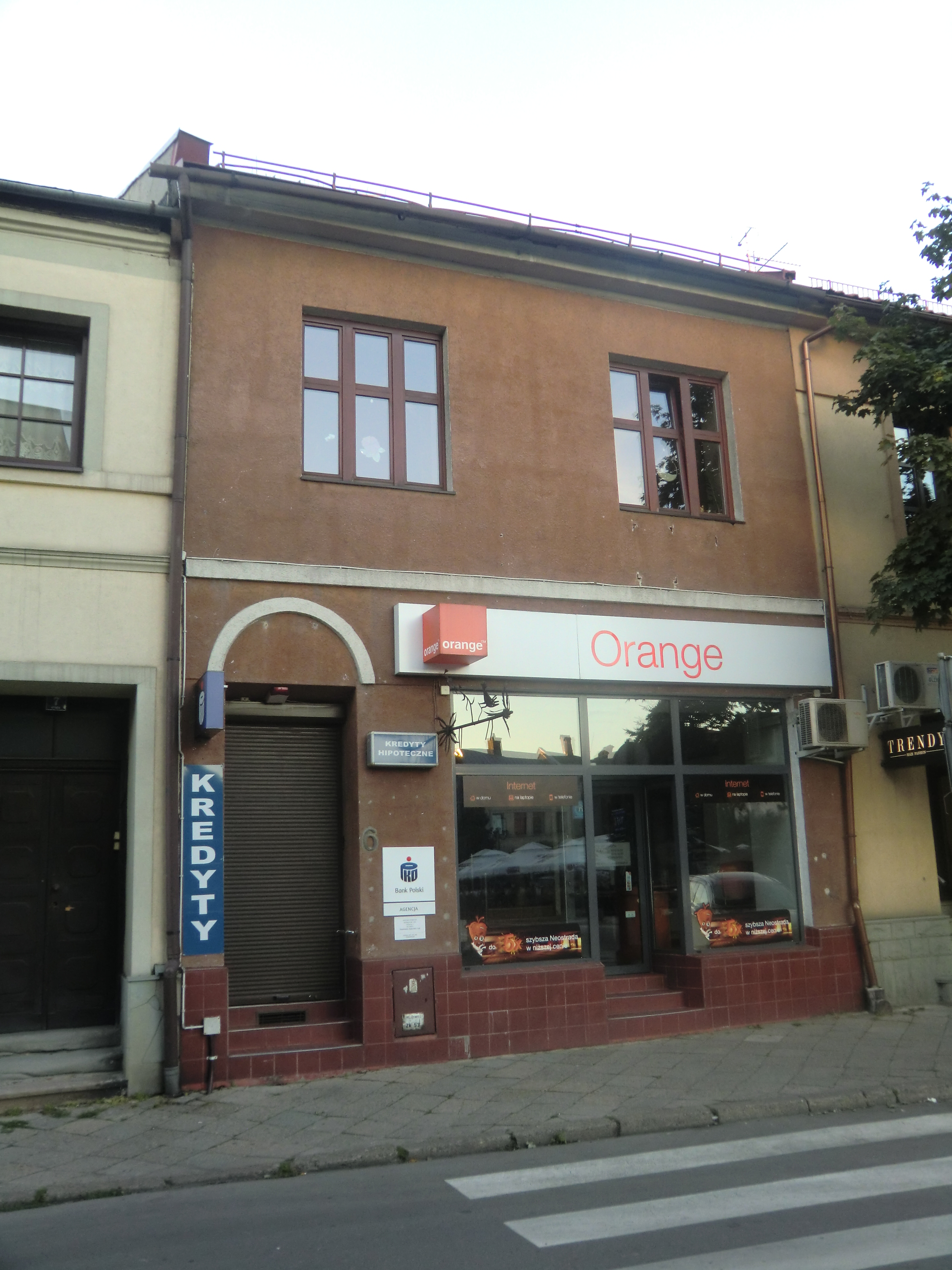 Budynek - Żywiec, Rynek 6